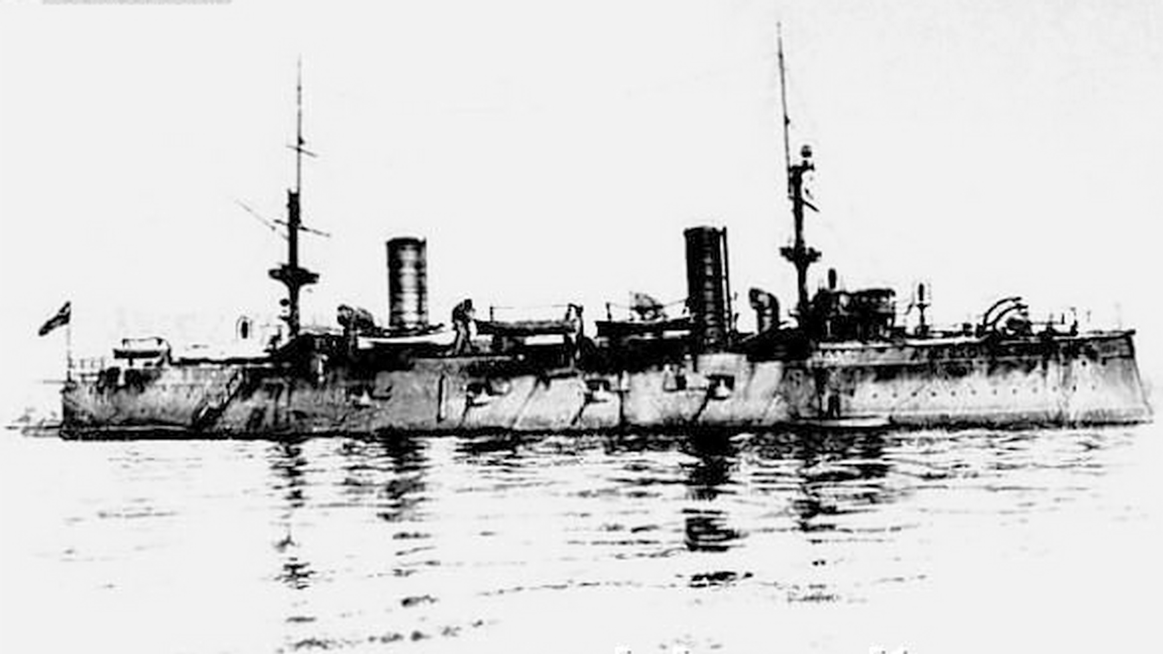 L'incrociatore Vettor Pisani ormeggiato alla fonda